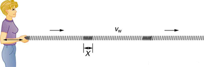 longitudinale Welle